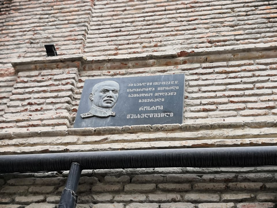 როტომ მუსხელიშვილის მემორიალური დაფა თბილისში, კოჯრის ქ. 4.